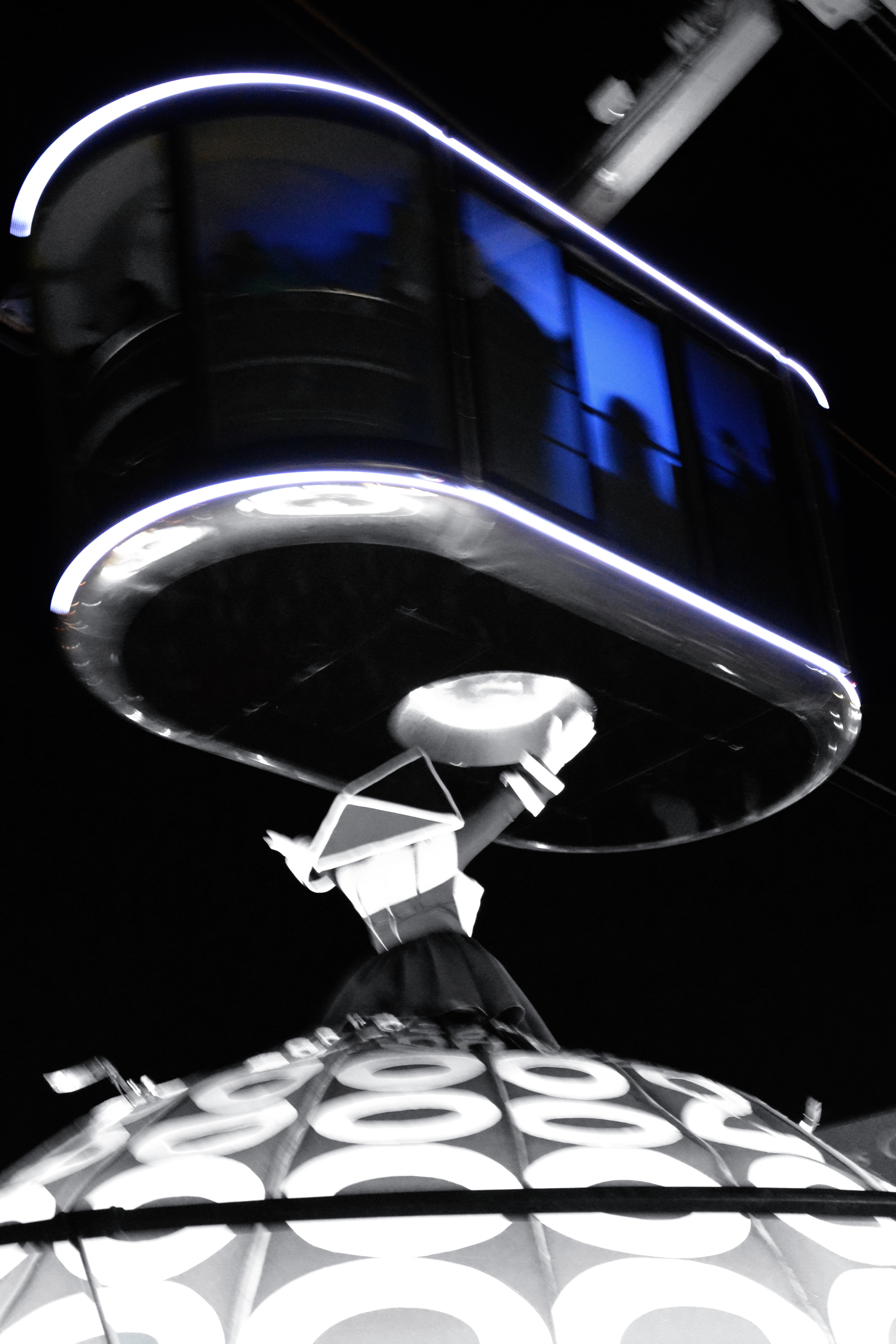 Spectacle de "poupées" géantes pour l'inauguration des Capucins comme pôle culturel et d'innovation